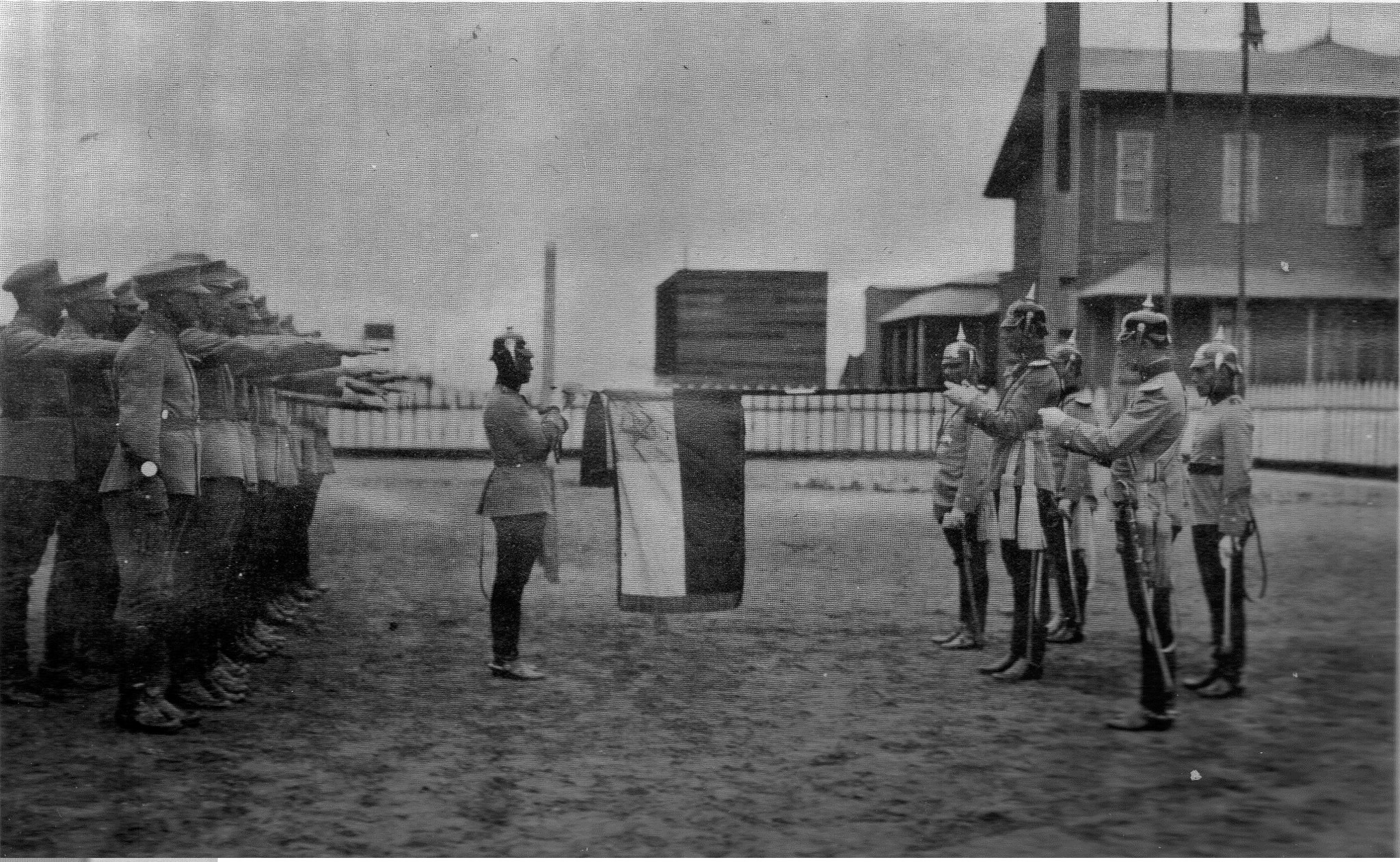 Juramento a la Bandera en el Regimiento Granaderos en 1920. Porta-estandarte Stte. Enrique Boedeker. Al fondo, el Comandante del Regimiento, May. Bartolomé Blanché y el ayudante Walton Ojeda